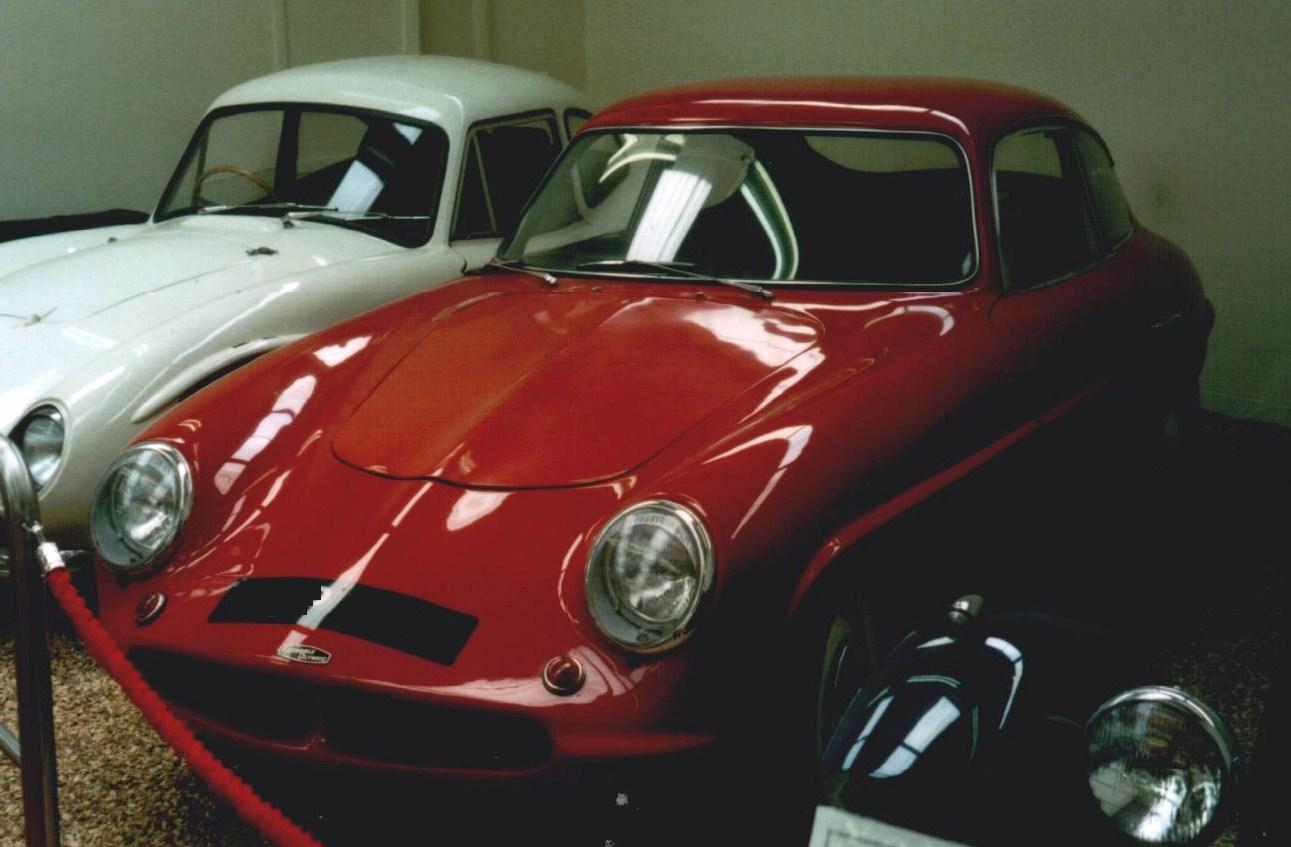 Rochdale